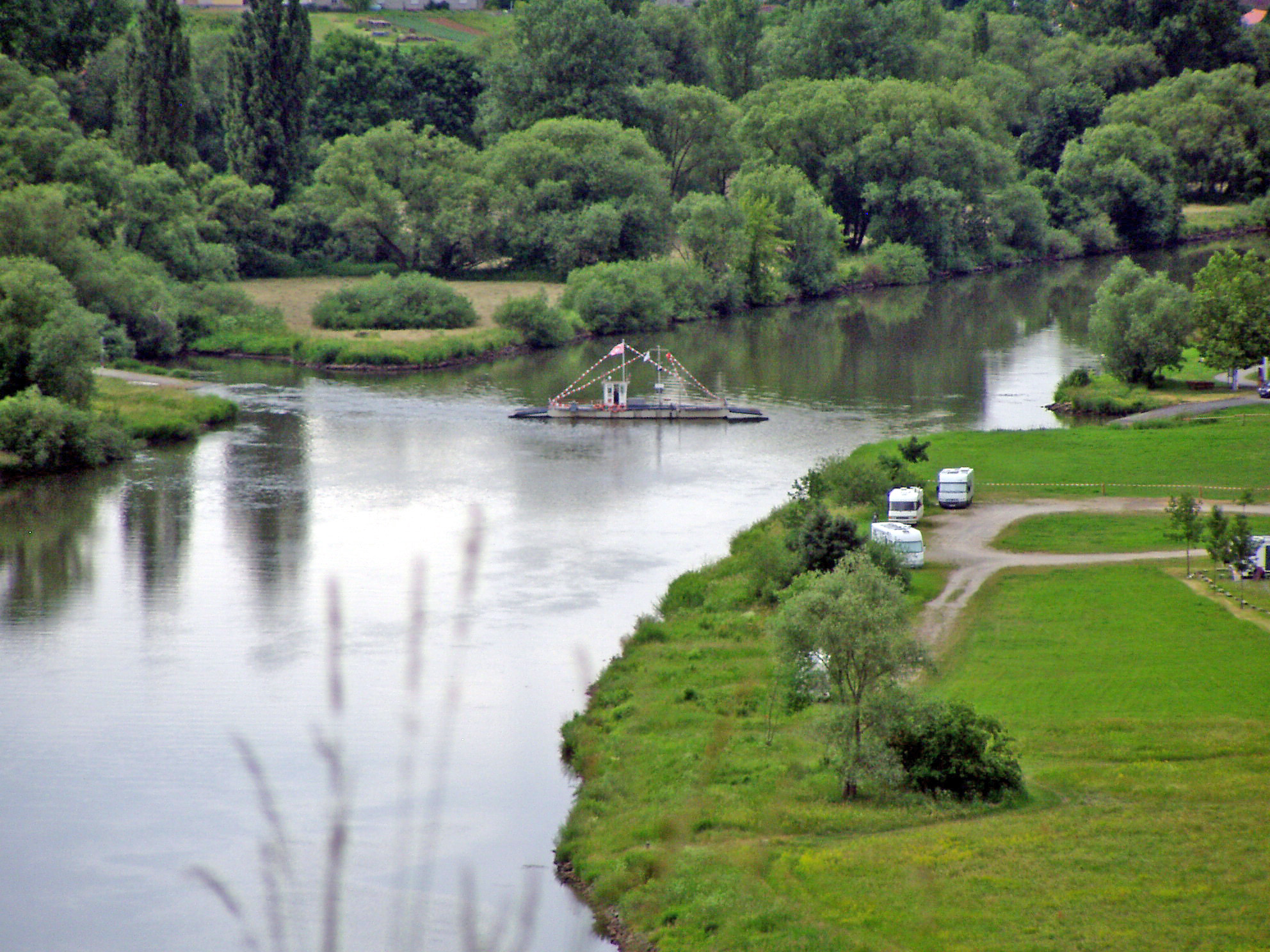 Die Mainfähre von Fahr nach Kaltenhausen, gesehen vom Vogelsberg